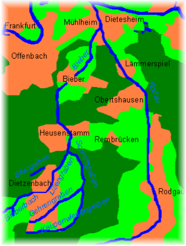 Lauf der Bieber und Lage ihrer Quellbäche: Stirngraben Stiergraben (in Dietzenbach) Schmittgraben (bildet sich hinter dem Industriegebiet Steinberg aus Kaupenwiesengraben und Gehrengraben) Kaupenwiesengraben (entspringt südlich von Hexenberg und läuft östlich von Dietzenbach am Waldrand) Gehrengraben (entspringt westlich von Hexenberg, fließt zwichen Hexenberg und Dietzenbach) Bild selbst gezeichnet durch --j11 am 30.06.2005